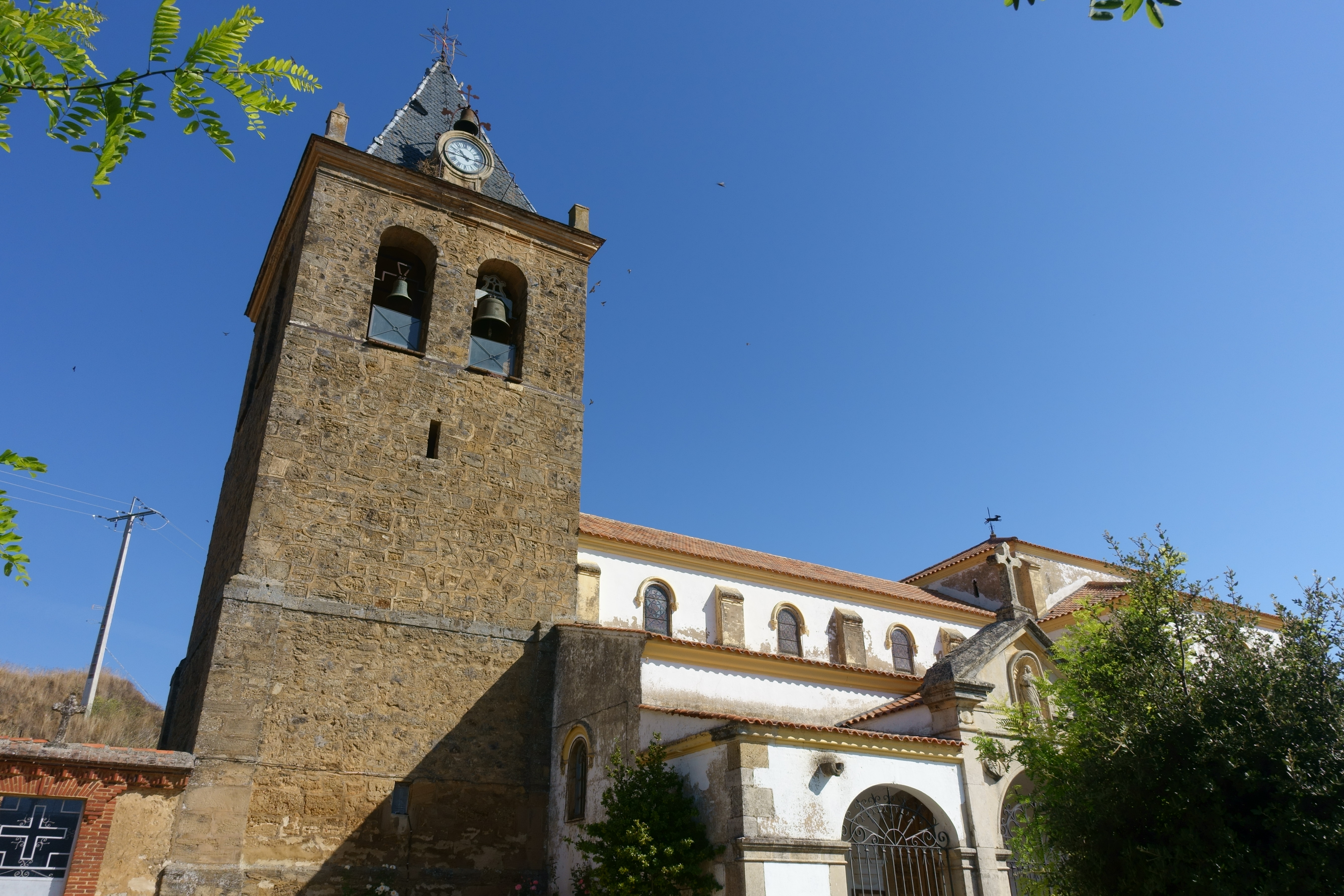 Iglesia de la Asunción de Nuestra Señora, Cea (León, España).